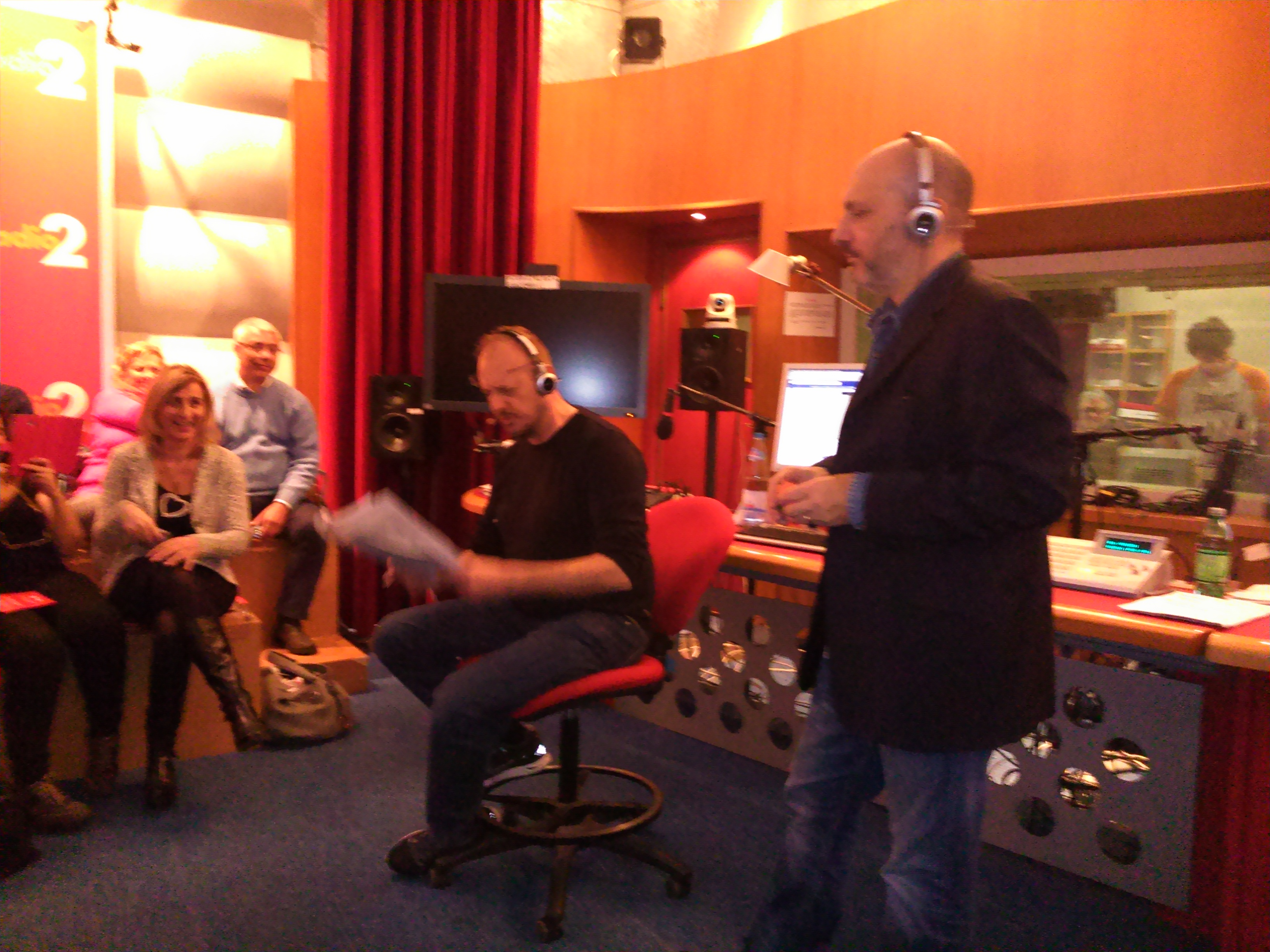 Marco Presta ed Antonello Dose mentre conducono Il Ruggito del Coniglio